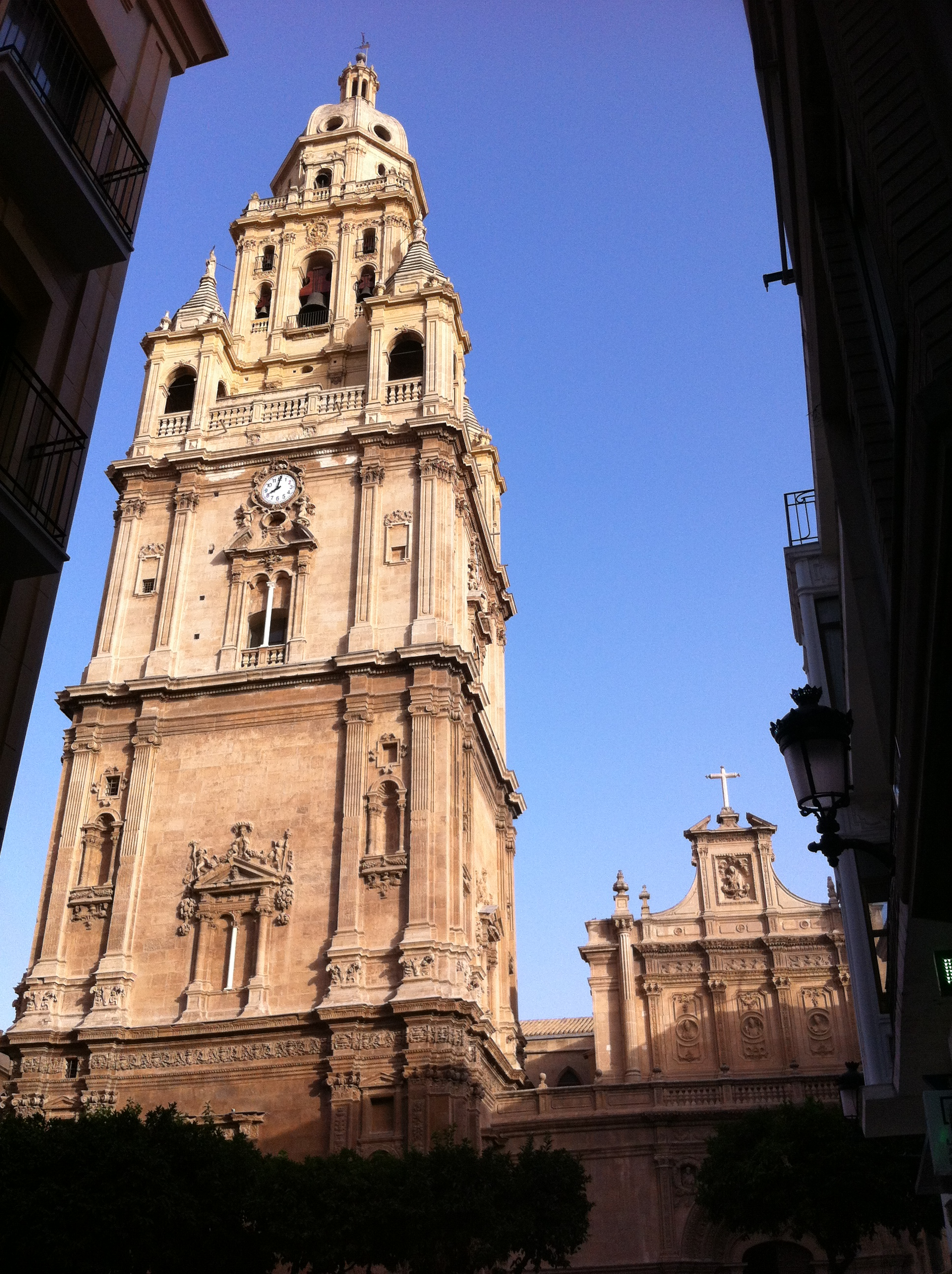 La Torre, de 93 metros de altura, de la Catedral de Santa María, en Murcia